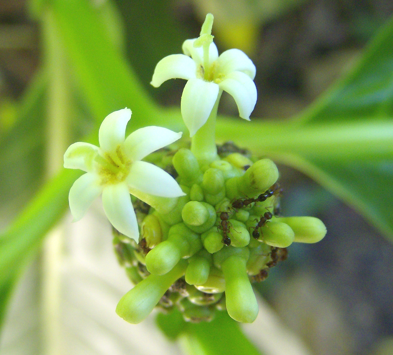 Esta es una flor del arbol de Morinda citrifolia, conocido coloquialmente como Noni